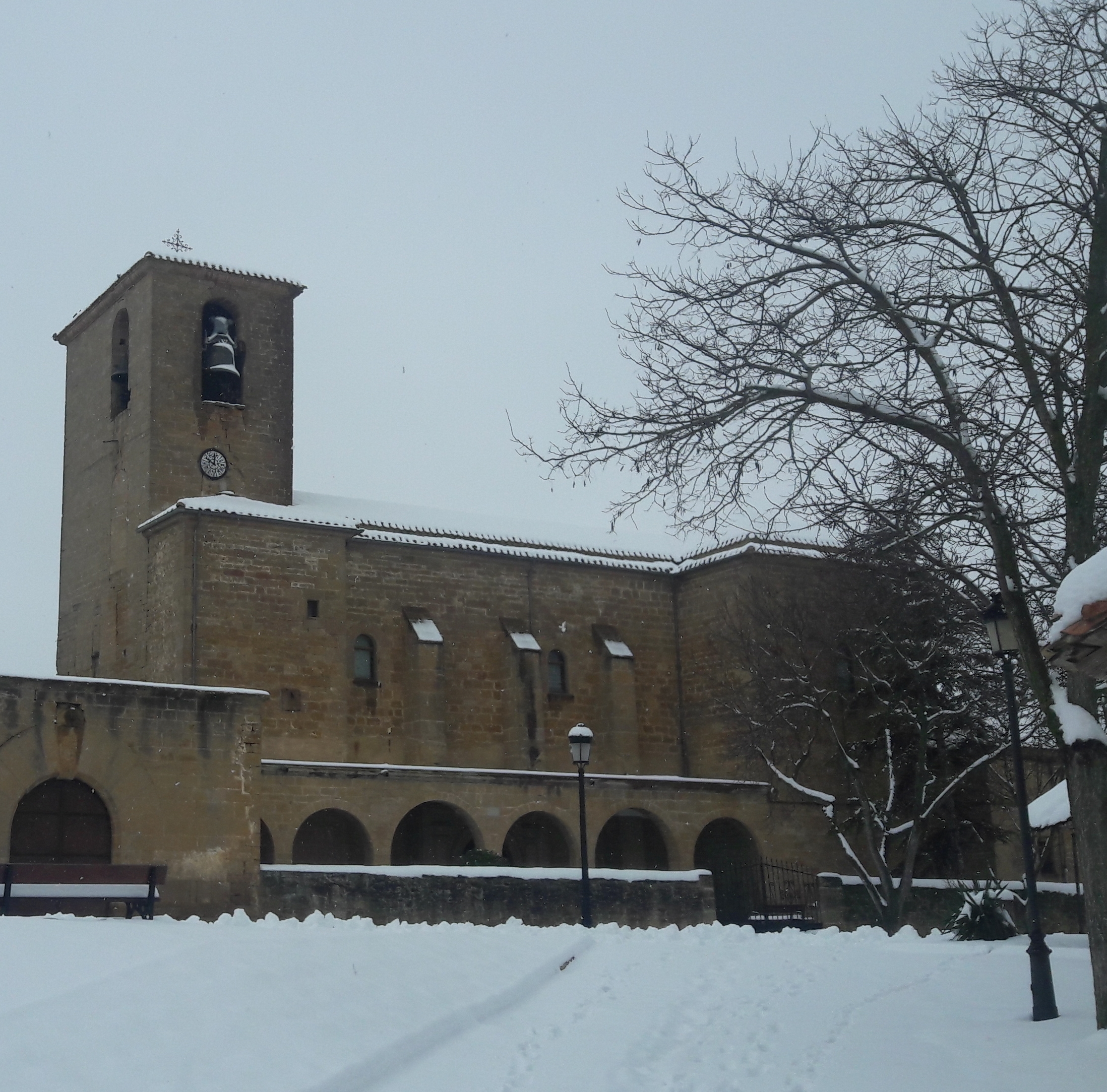 Esta foto la hice el 28 de febrero de 2018, día en que cayo una gran nevada en Garinoain, y en la foto se ve la Iglesia de San Martin de Tours de Garinoain con sus tejados cubiertos de nieve